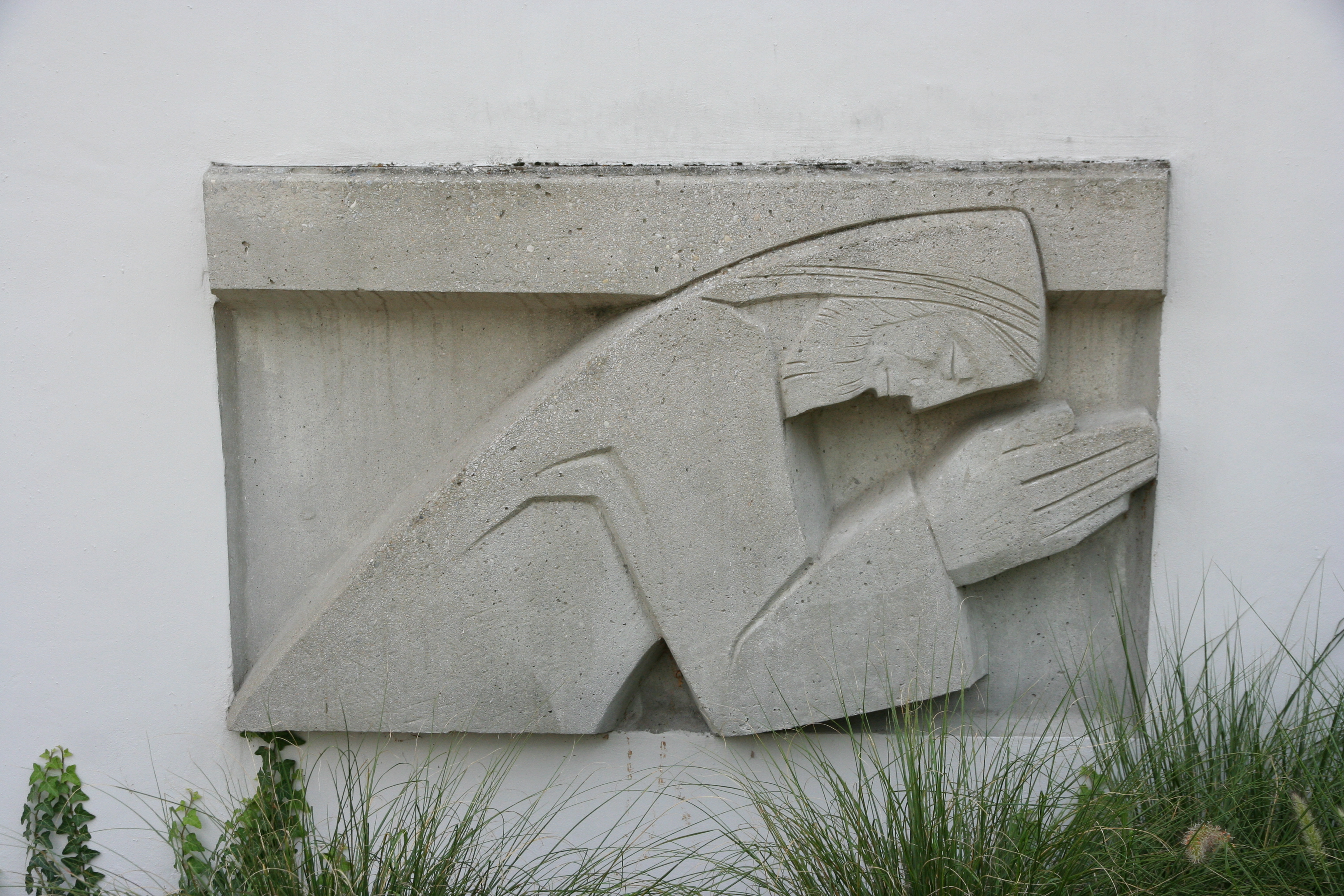 Römisch-katholische Pfarrkirche St. Christophorus Wangen an der Aare